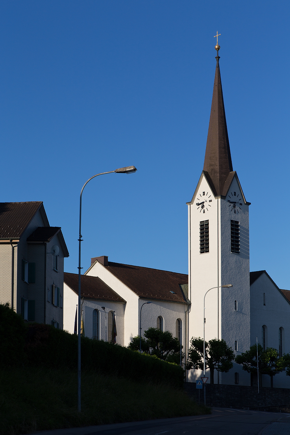 Die katholische Kirche in Sirnach